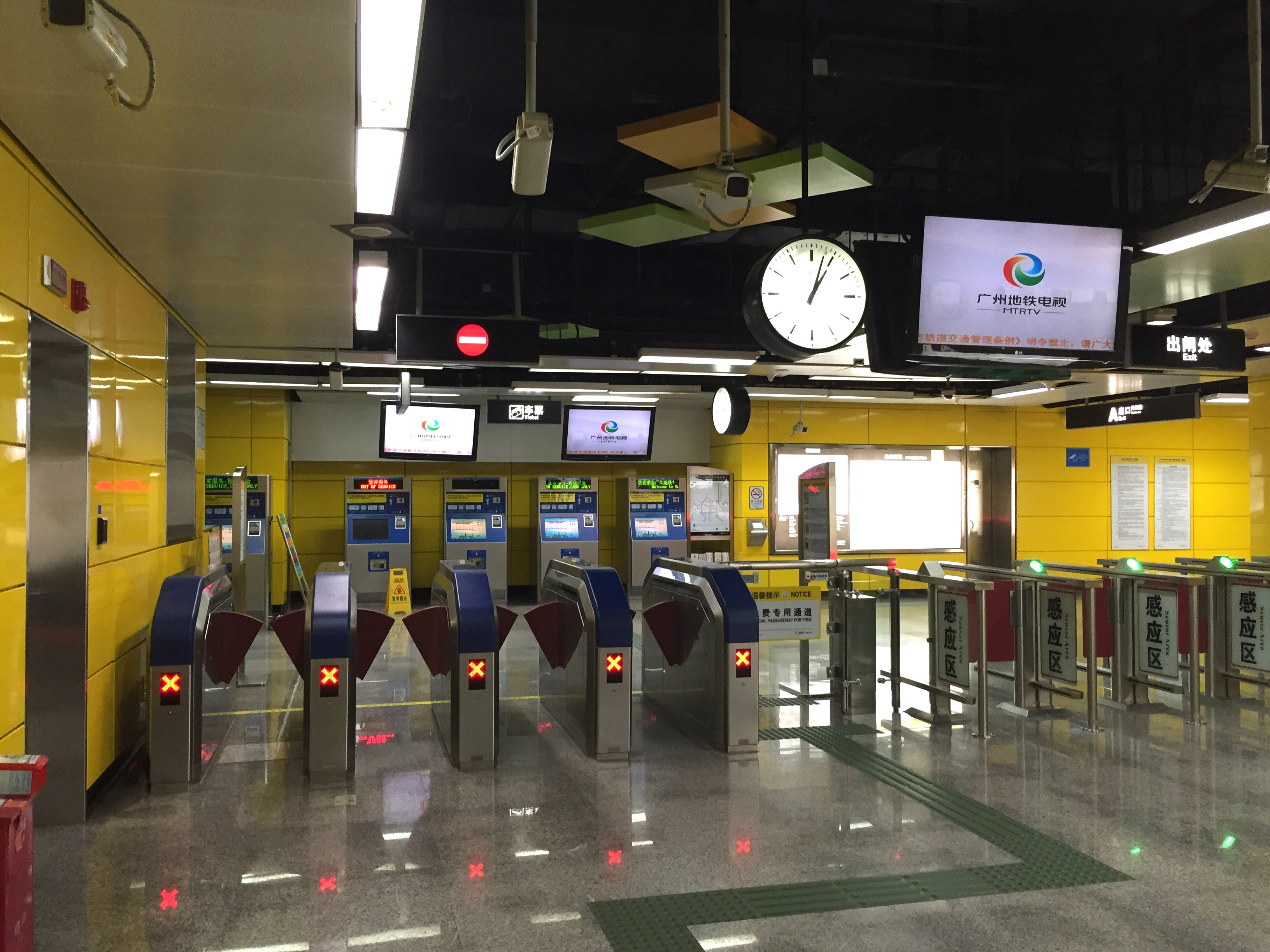 广州地铁体育中心南站